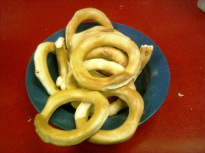 Roscas chonchinas, comida típica de Chonchi (Chiloé, Chile)